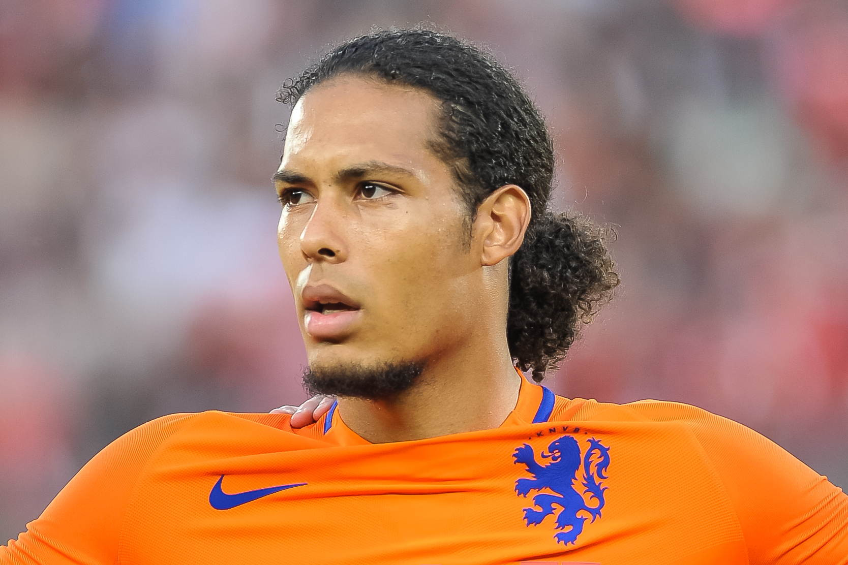 Wien, 4.6.2016, ÖFB Laenderspiel - Österreich vs Niederlande. Bild zeigt Virgil van Dijk (NED).